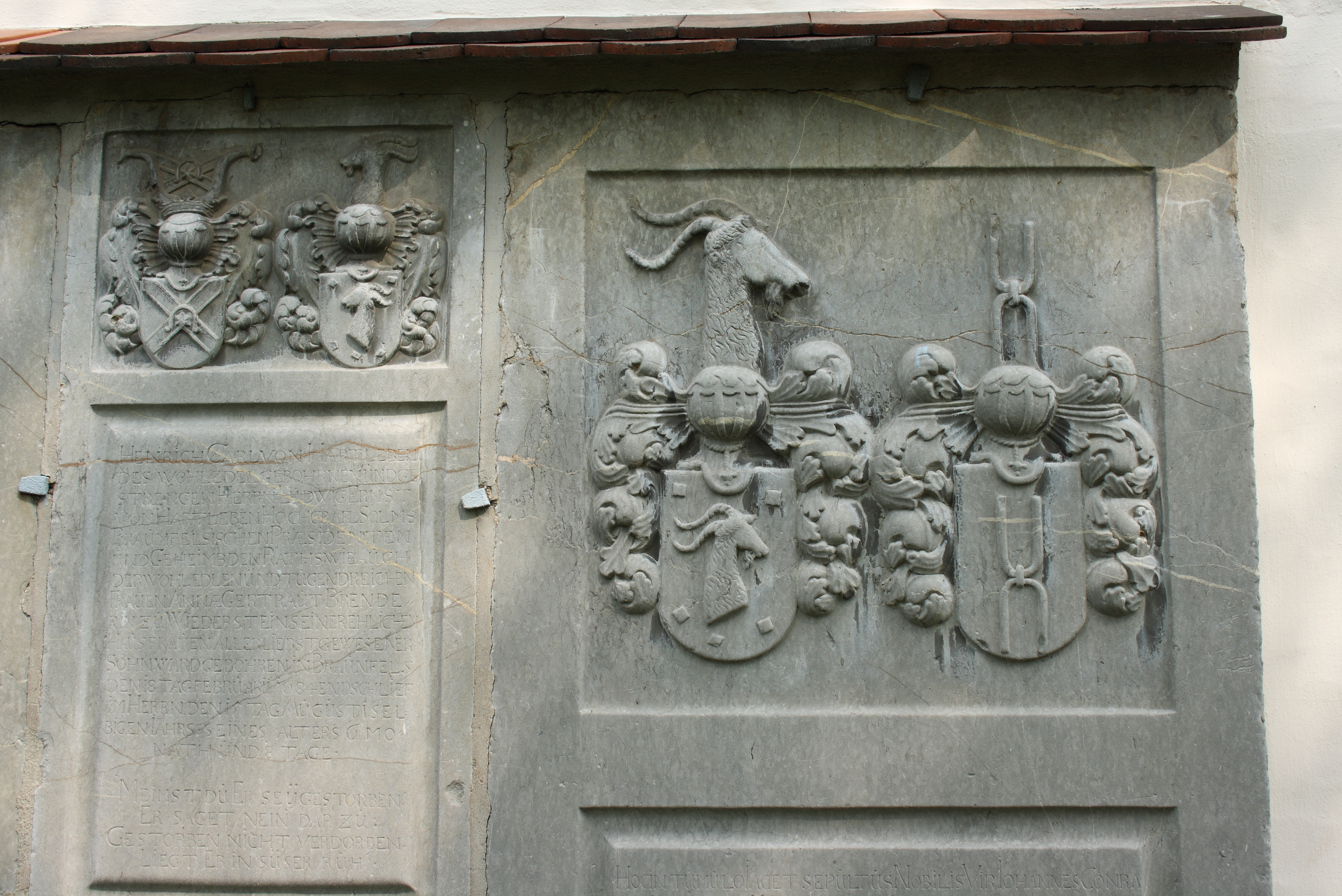 Evangelische Friedhofskirche St. Georgen, St.-Georg-Straße 19, Braunfels, Lahn-Dill-Kreis (Hessen), Epitaphien an der Außenmauer der Kirche, mit Wappen